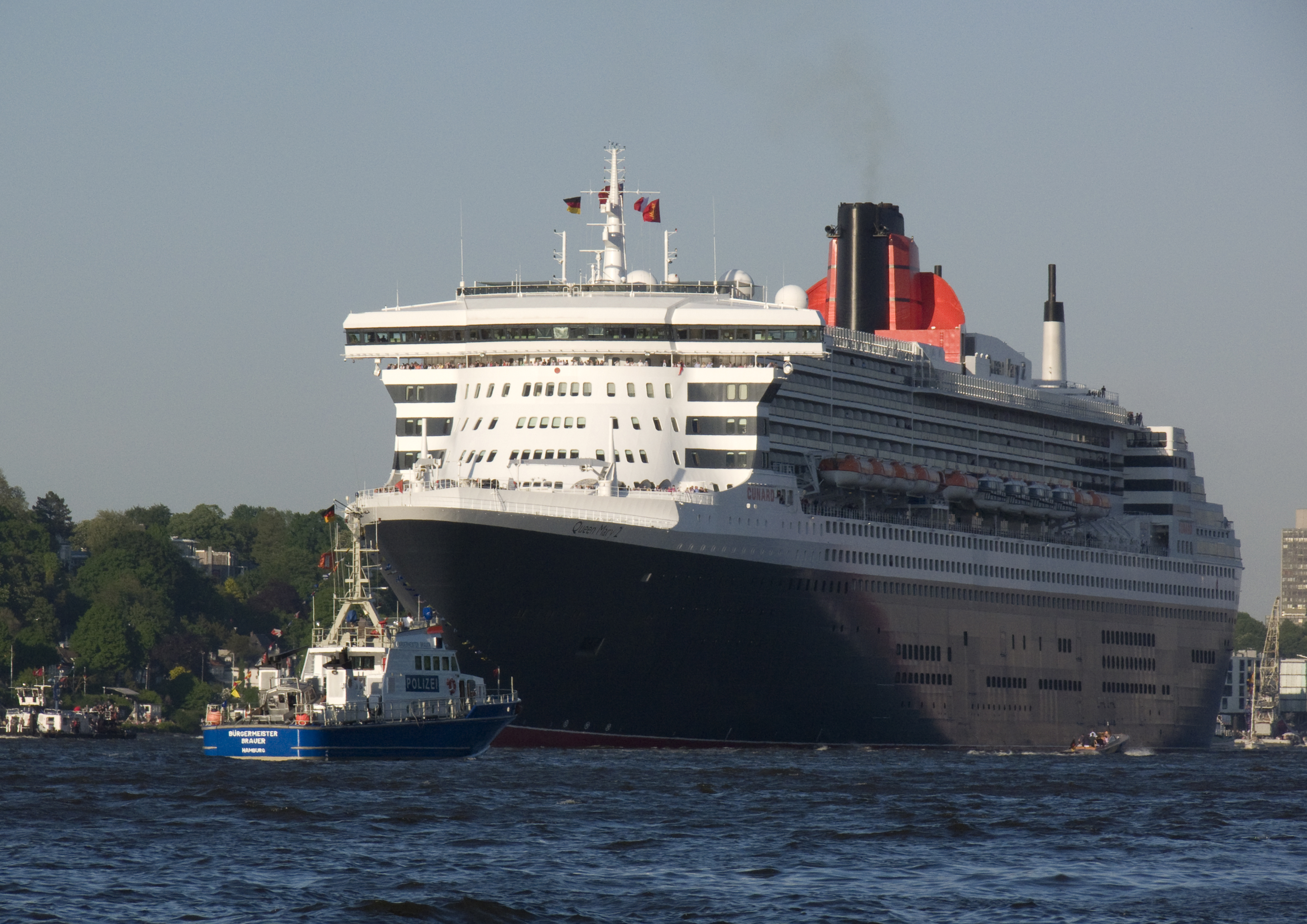 8 Mai 2011 Auslaufparade Hamburg Outbound